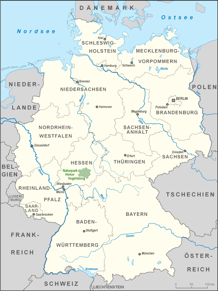 Karte des Naturparks Hoher Vogelsberg in Deutschland